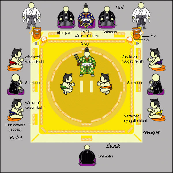 Dohjó